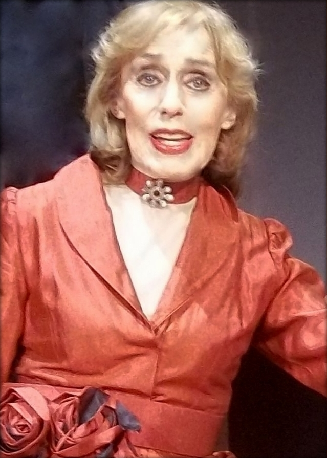 Estela Medina 2014